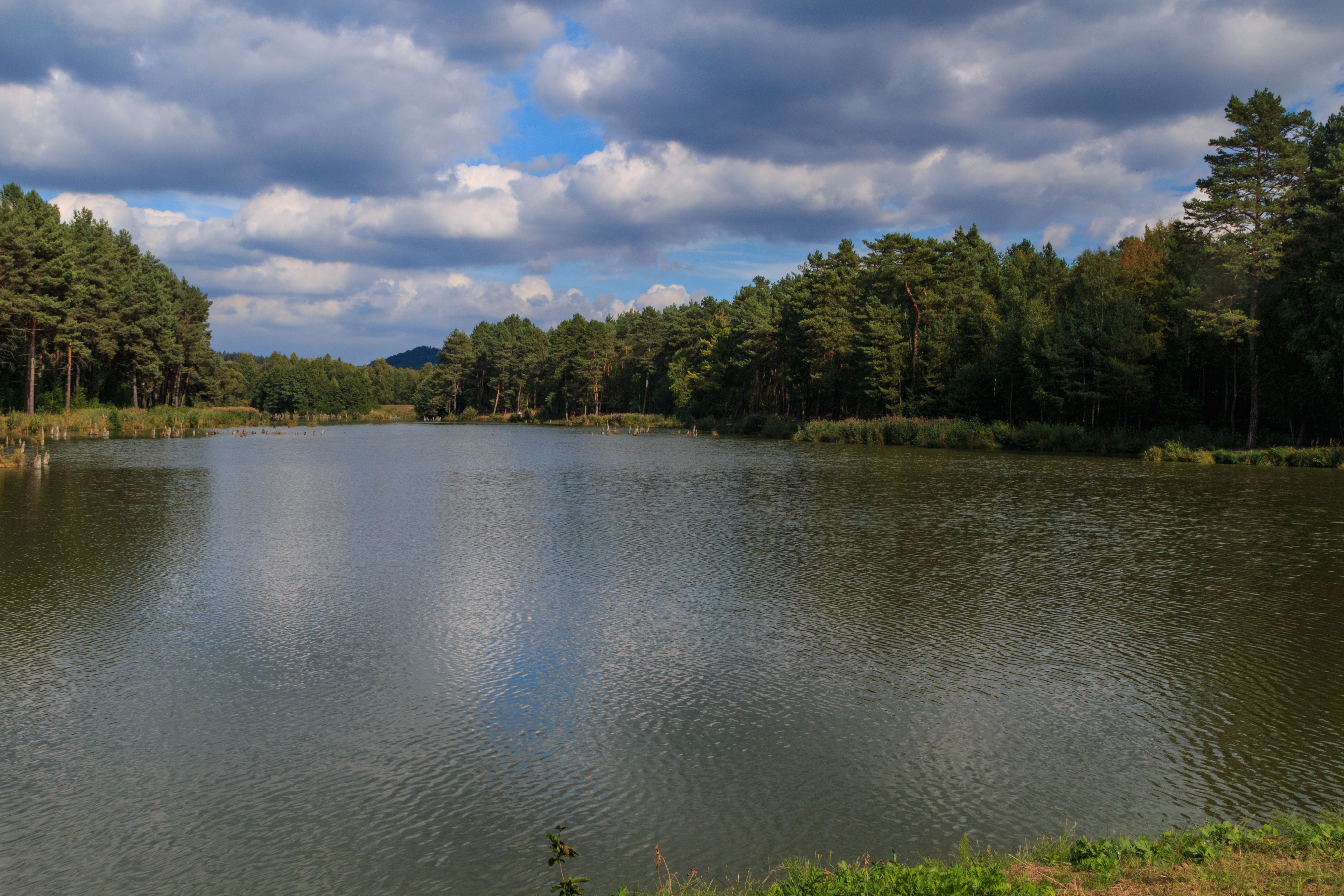 Rybník Hvězdov IV Project: Vodstvo.